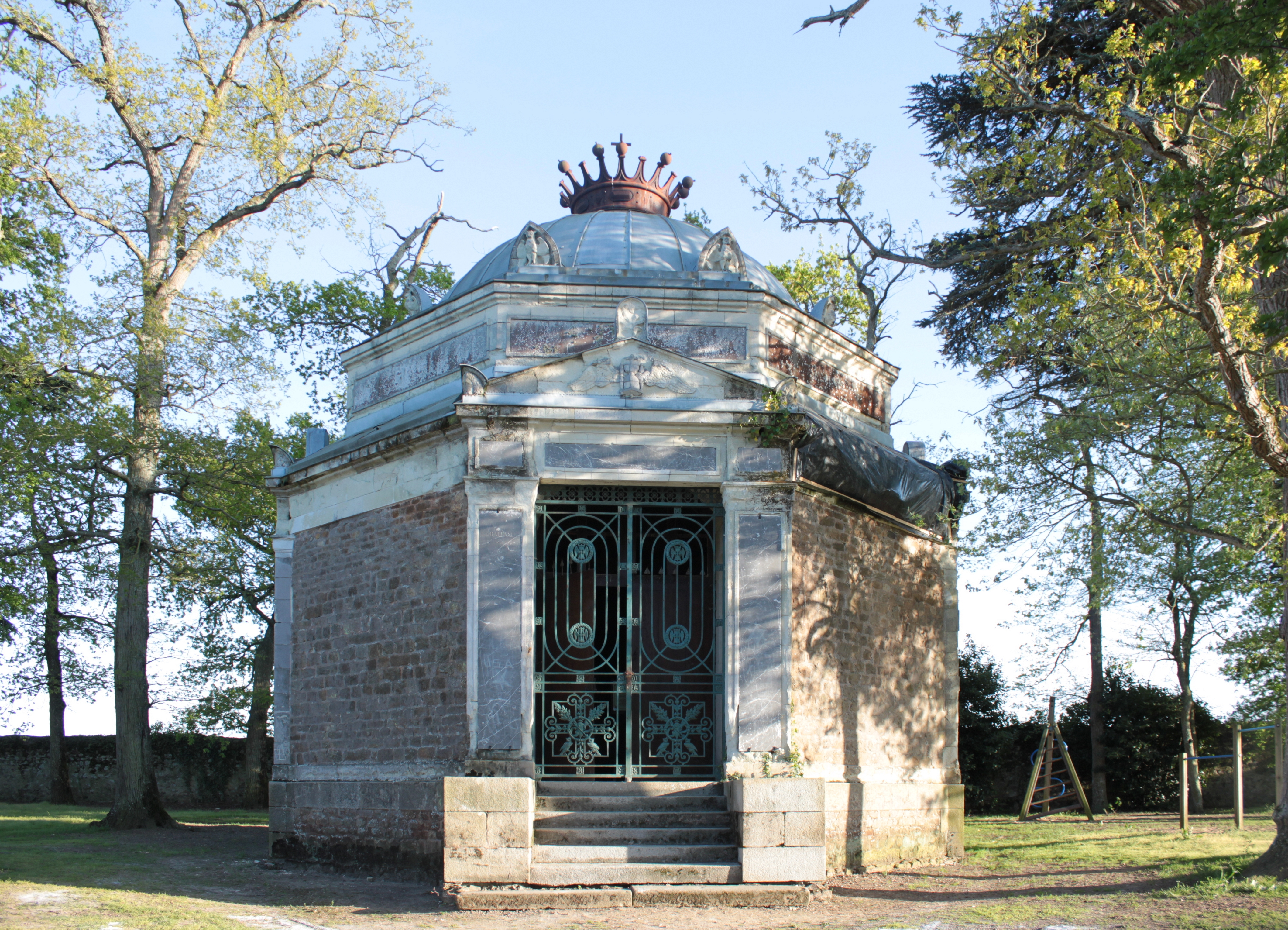 Chapelle Sainte-Sophie, dite l'Enfeu. Fr-49-Bouzillé.